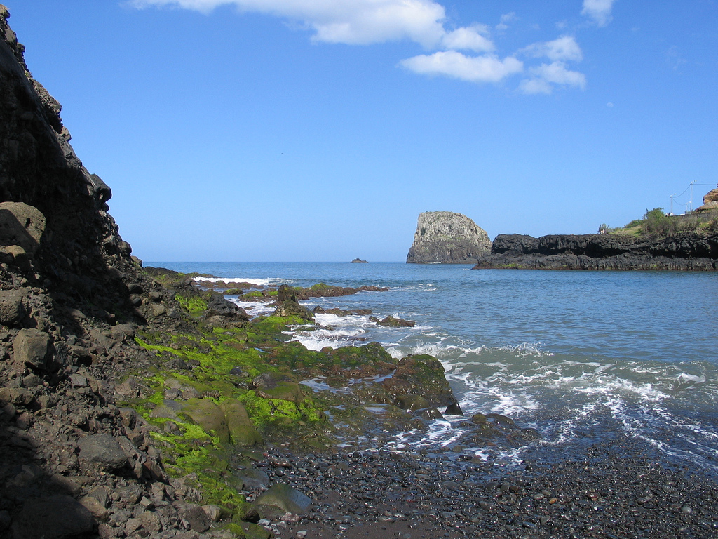 Porto da Cruz, Madeira, Portugal